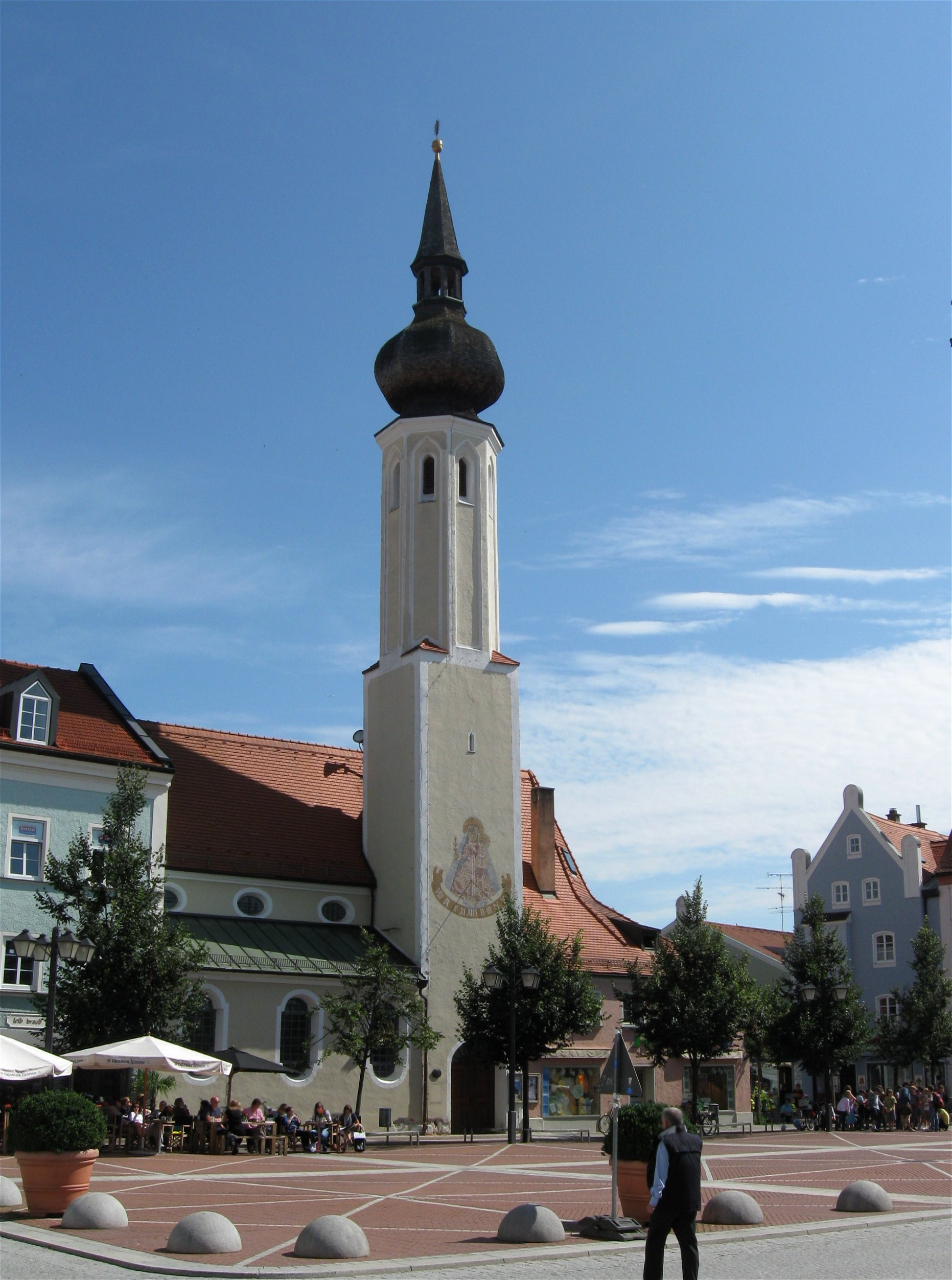 Schrannenplatz 3. Ehem. Frauenkirche, Ende 14. Jh., seit dem 19. Jh. profanisiert.